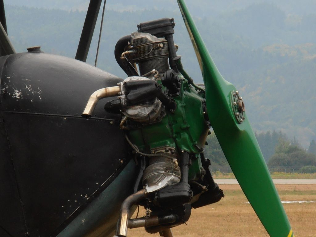 Detail motora lietadlo Polikarpov Po-2.